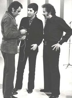 Foto di autore anonimo realizzata nel 1971 durante le registrazioni di "Teatro 10" a Roma ritraente Alberto Lupo, Antonello Falqui e Domenico Modugno